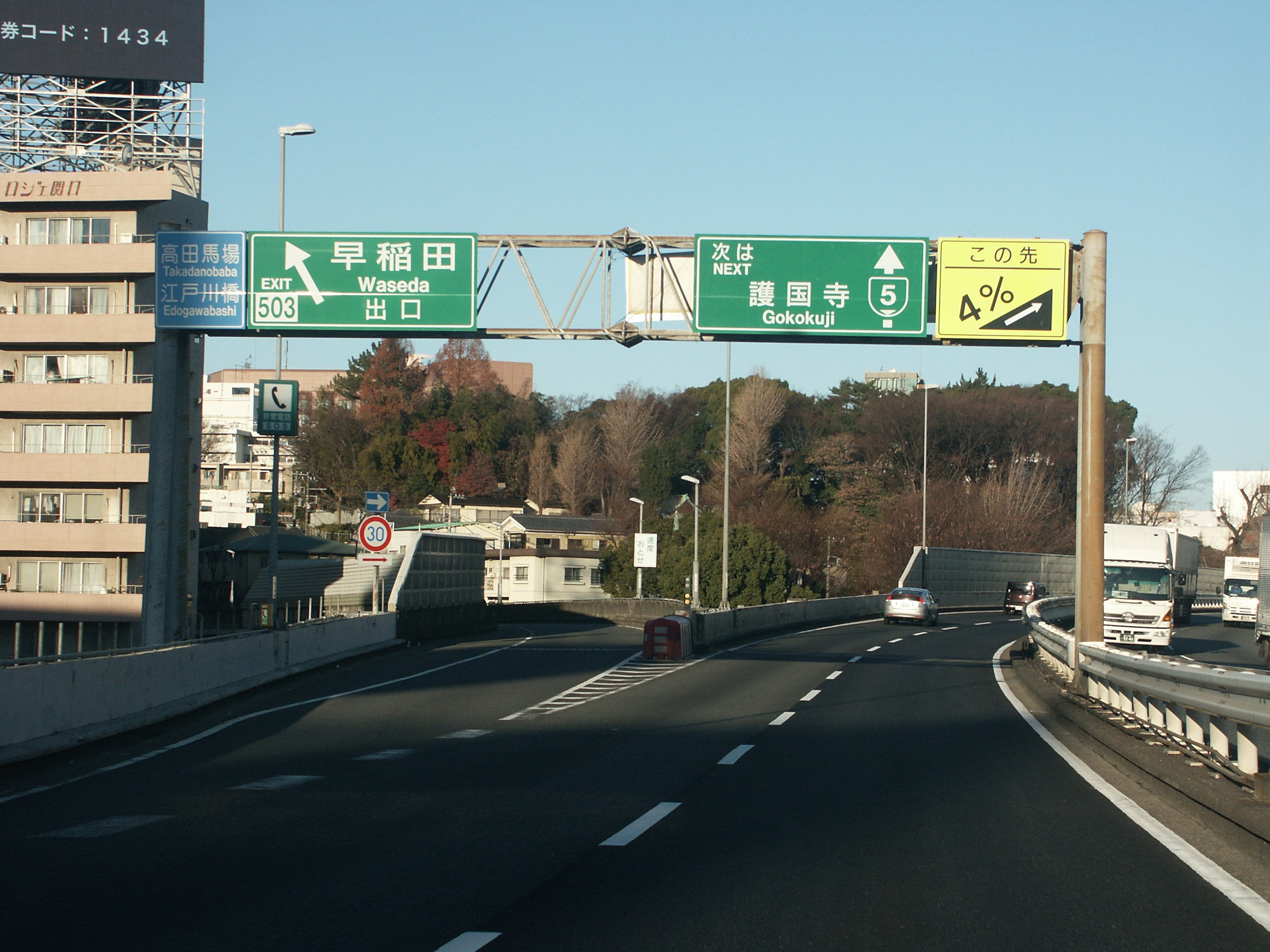 首都高速道路5号池袋線下り早稲田出口付近